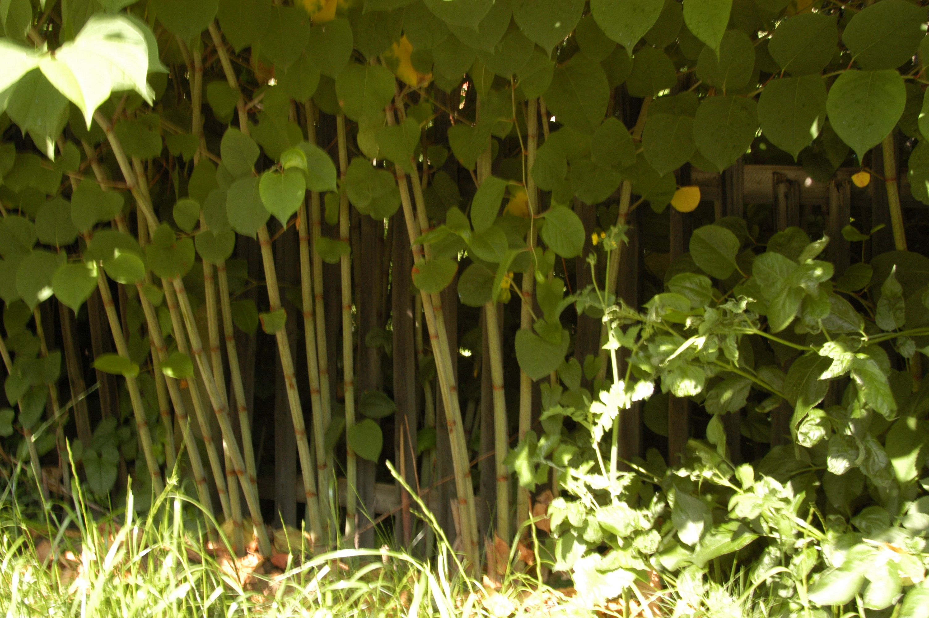 Japanische Staudenknöterich (Fallopia japonica)